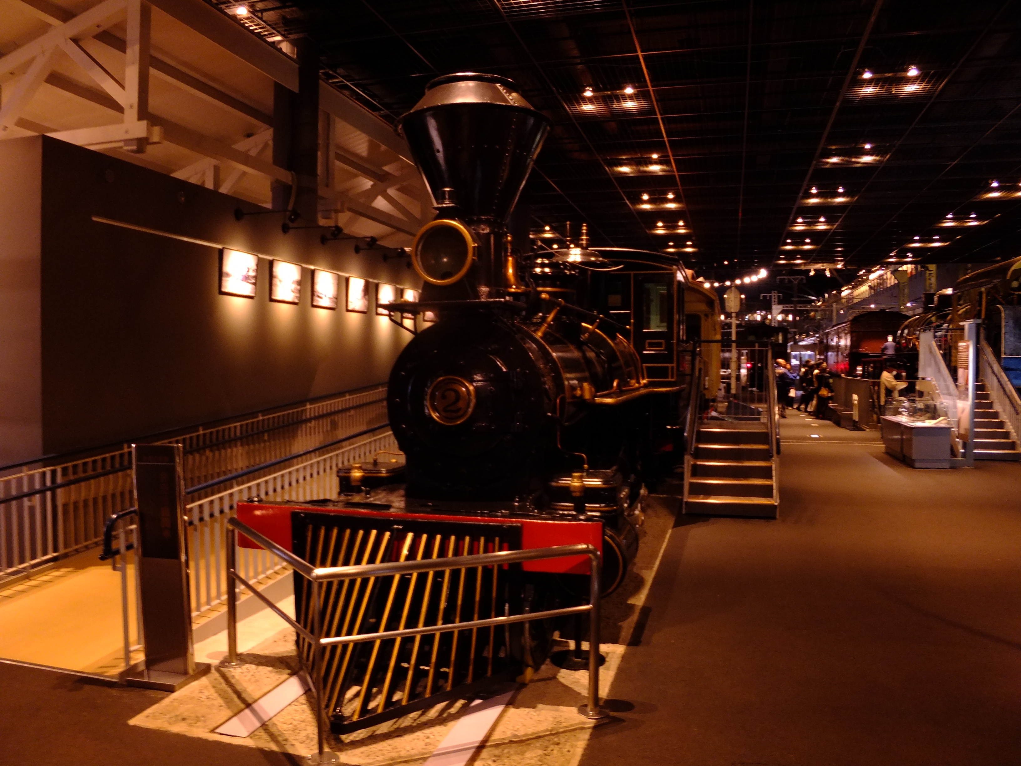 官営幌内鉄道7100形蒸気機関車「弁慶号」（辯慶）、さいたま市・鉄道博物館にて